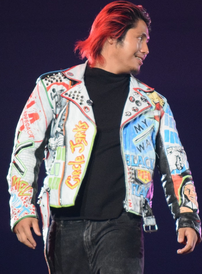 2016年11月5日 大阪府立体育会館「POWER STRUGGLE」 高橋広夢